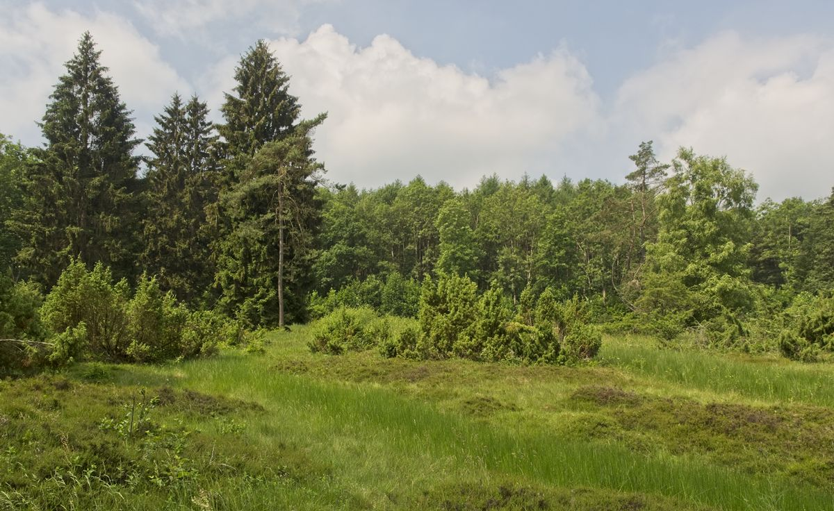 In der Gambach